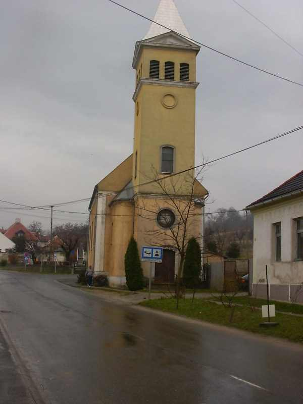 Evangélikus templom (Balf, Sopron)